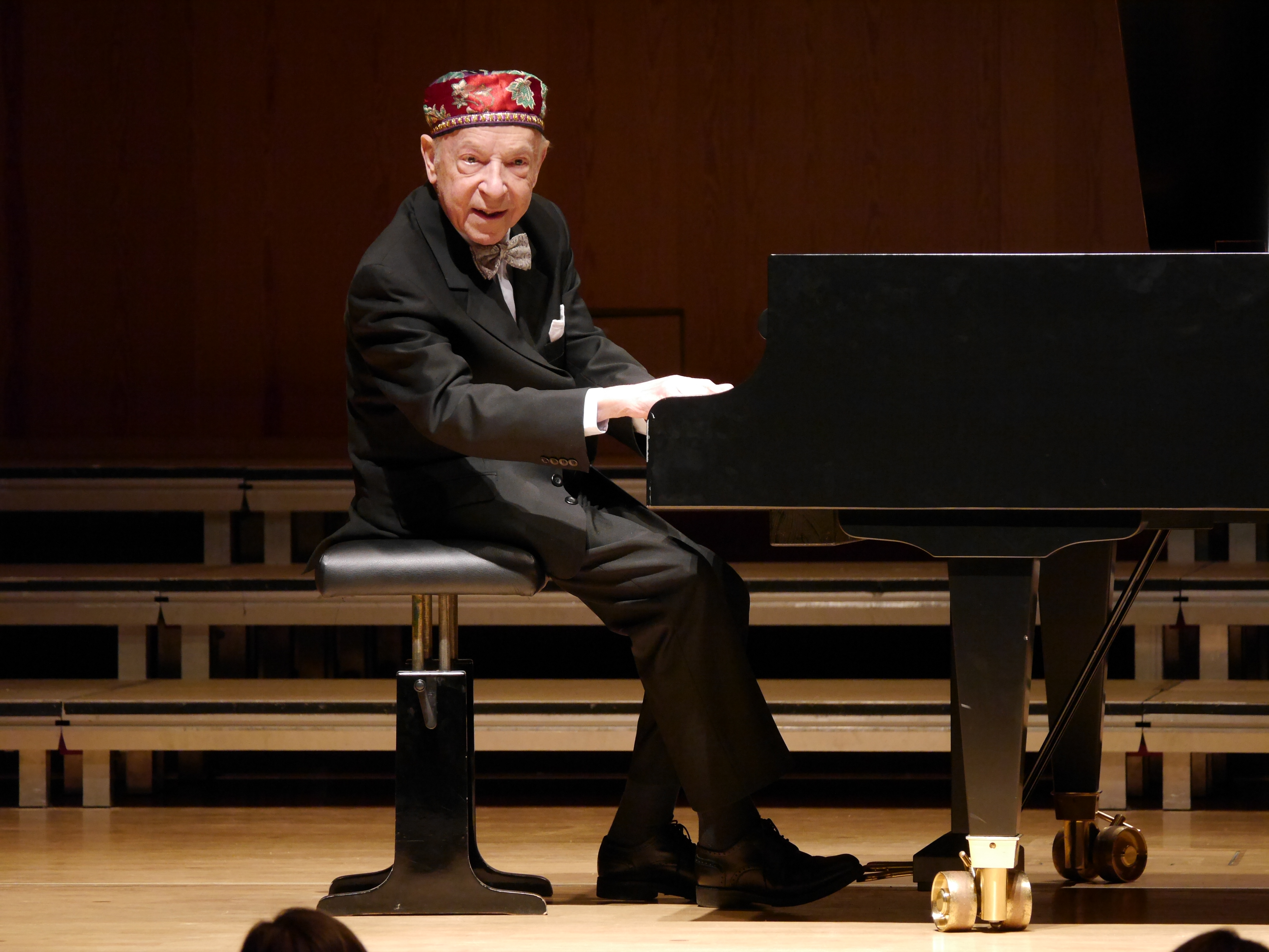 Paul Badura-Skoda am 06.02.2018 im Konzerthaus der HfM Detmold.